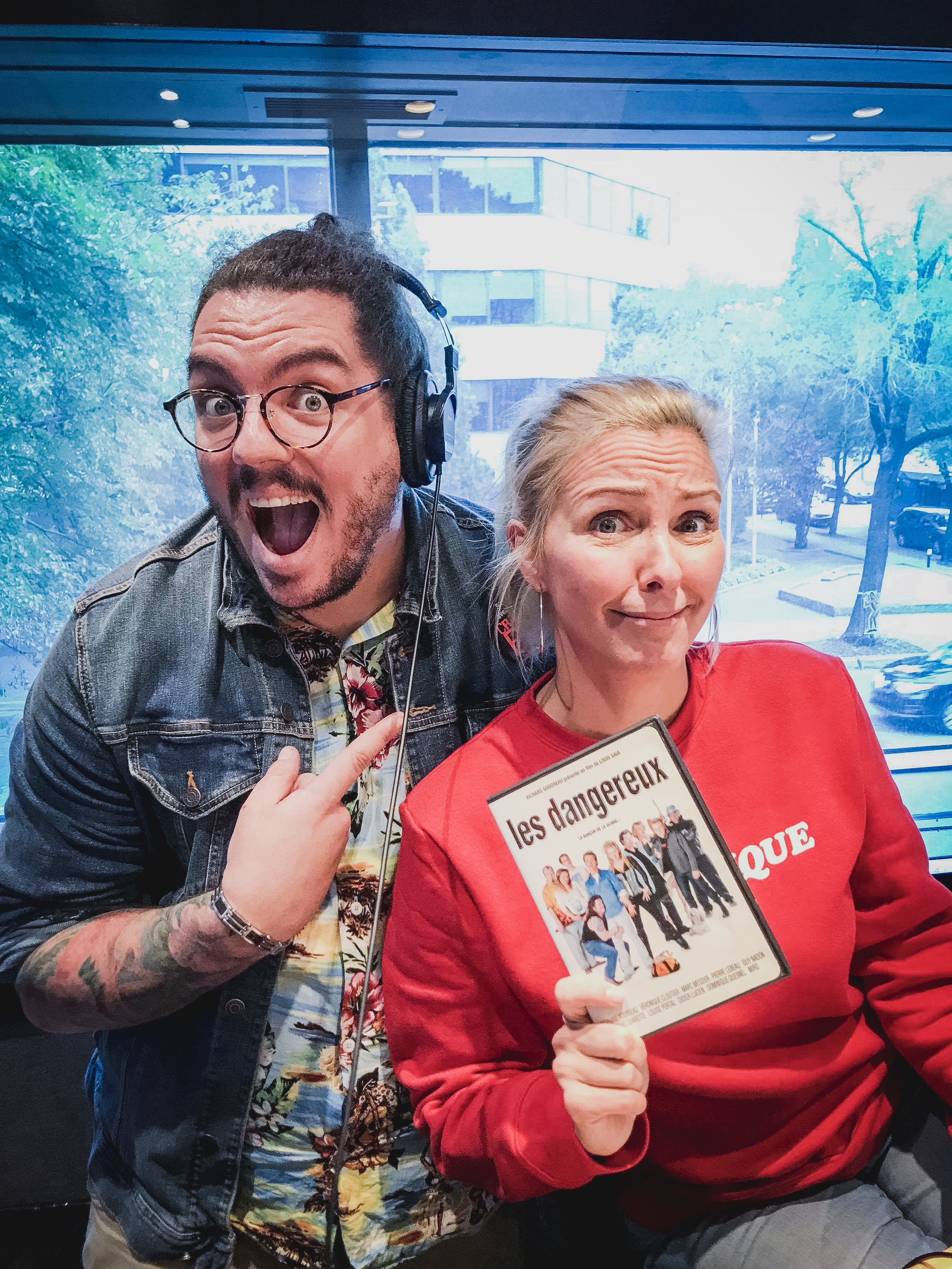 Cette photo à été prise dans les studios de Rouge FM en septembre 2018 alors que Marc-André Roy réalisait son rêve de chanter "La ballade des Dangereux" avec Véronique Cloutier.